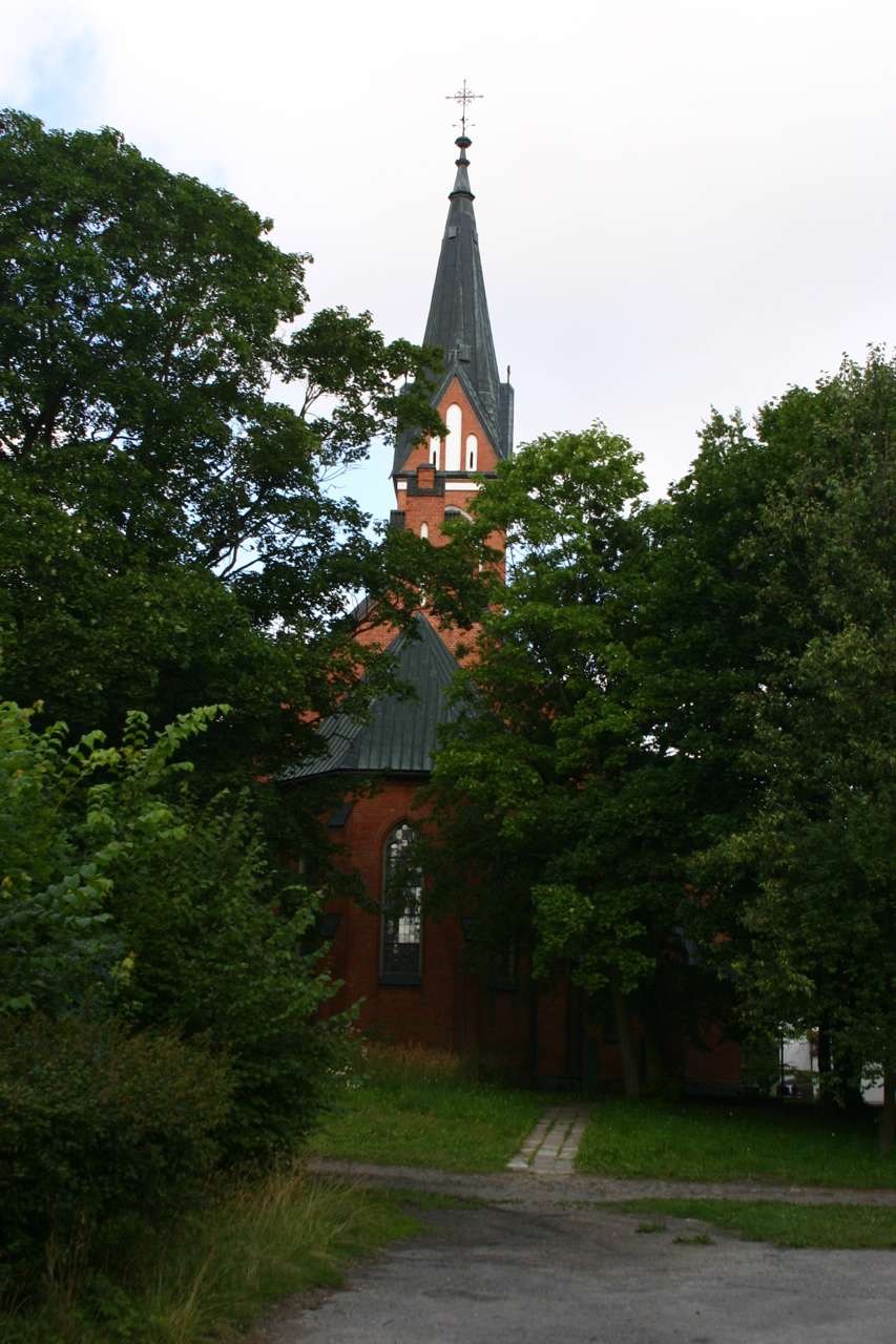 Karolewo - wieś w woj. warmińsko-mazurskim, w pow. kętrzyńskim, w gminie Kętrzyn.